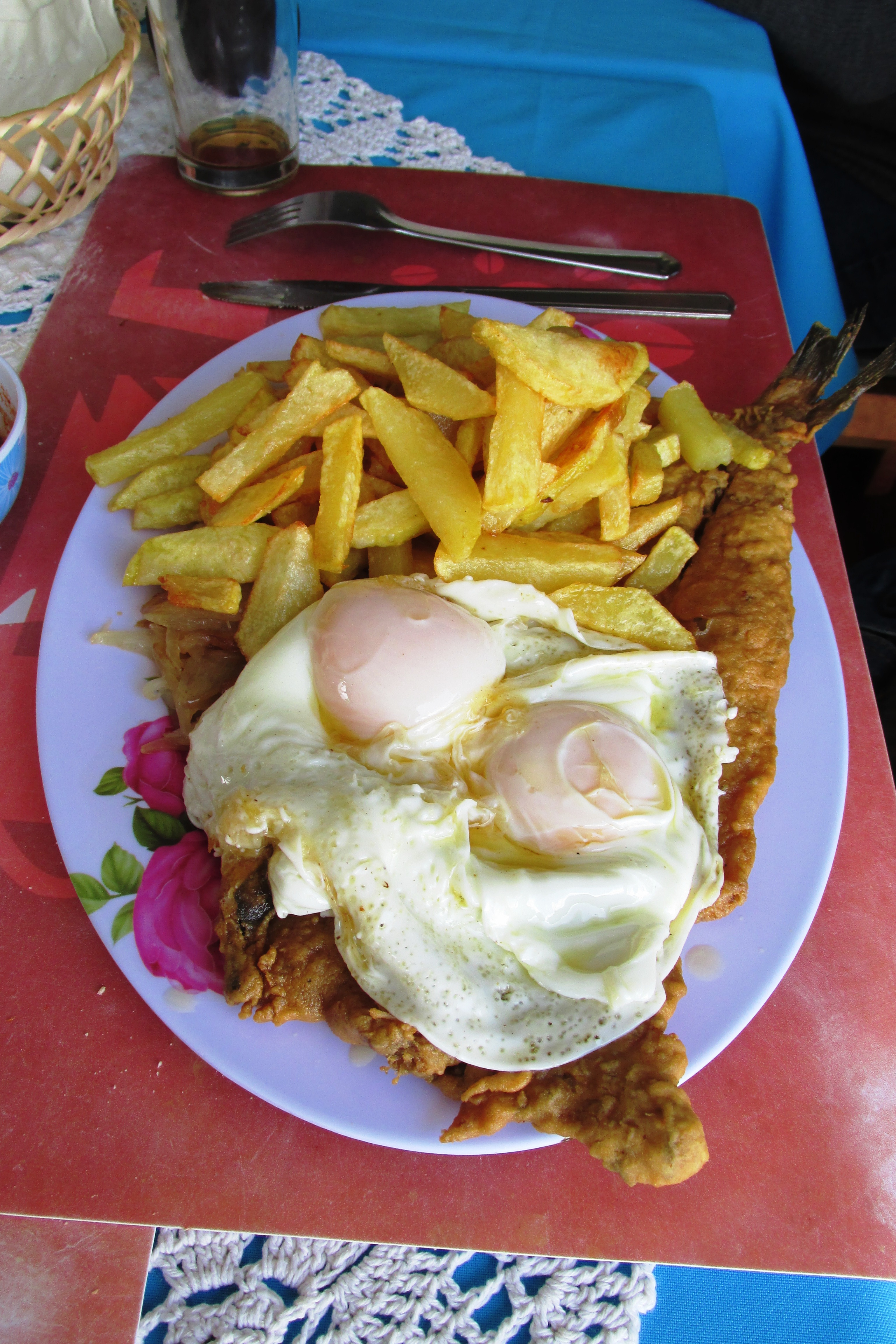 Merluza a lo pobre